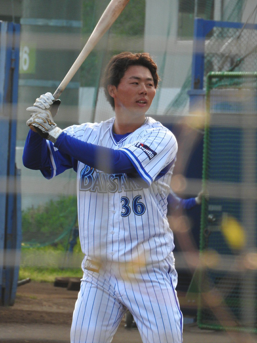 現役時代。2019年4月22日ベイスターズ球場にて